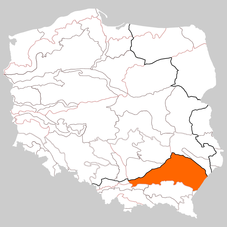 Physico-geographical regionalization of Poland Macroregion 512.4-5 Sandomierz Basin Regionalizacja fizycznogeograficzna Polski Makroregion 512.4-5 Kotlina Sandomierska